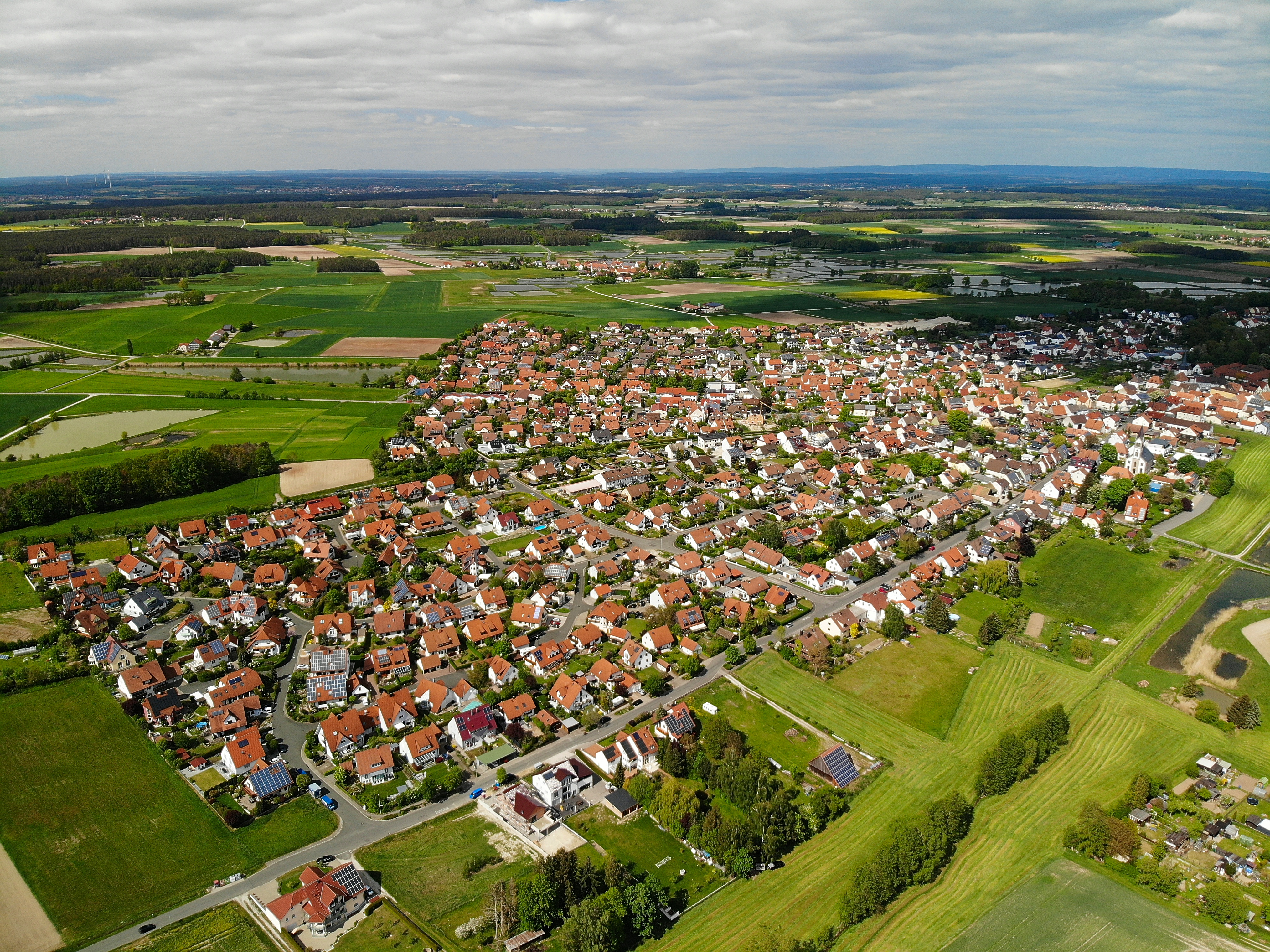 Weisendorf Luftaufnahme (2020)